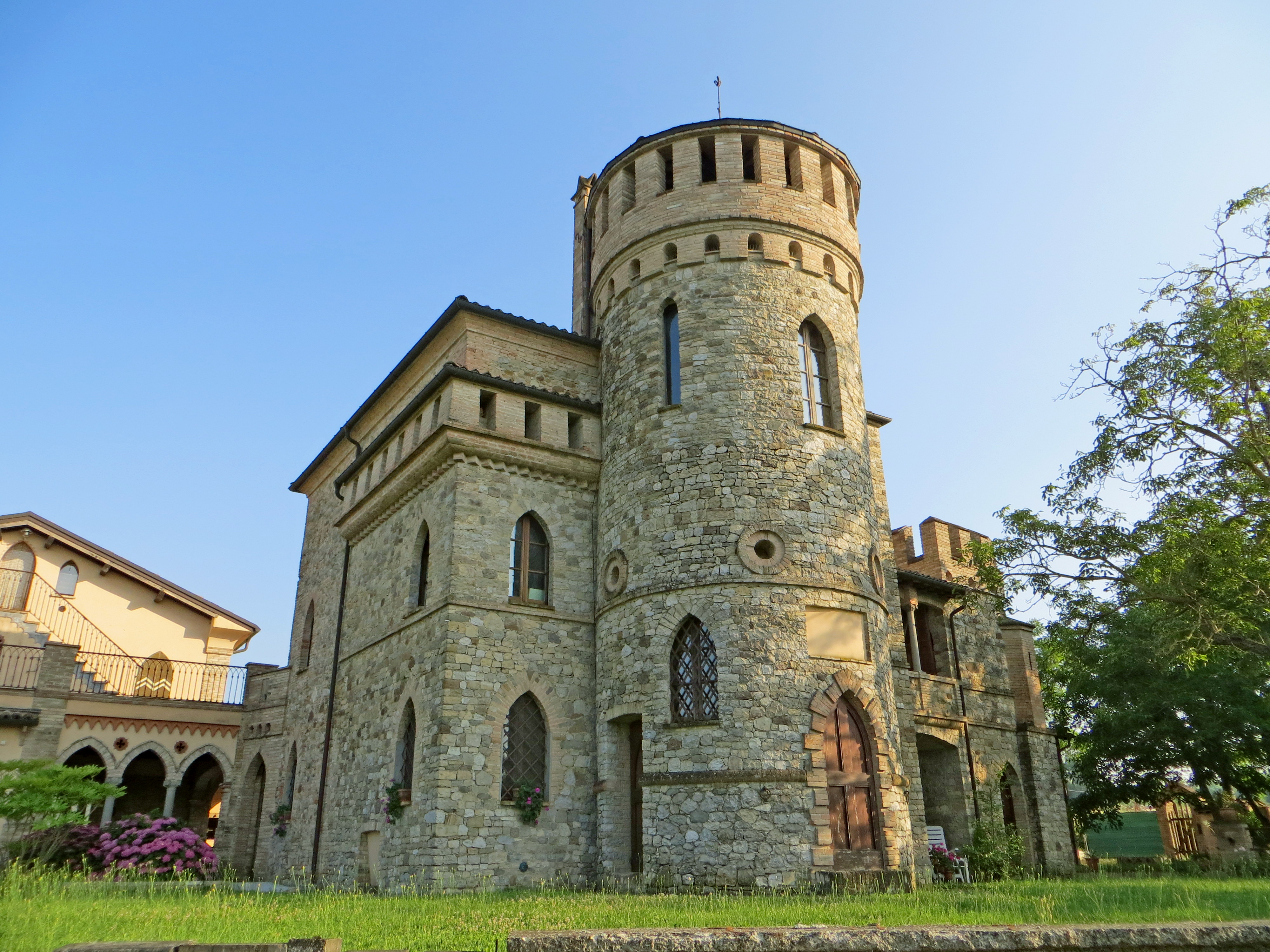 Villa Magnani (Mamiano, Traversetolo) - castelletto neogotico